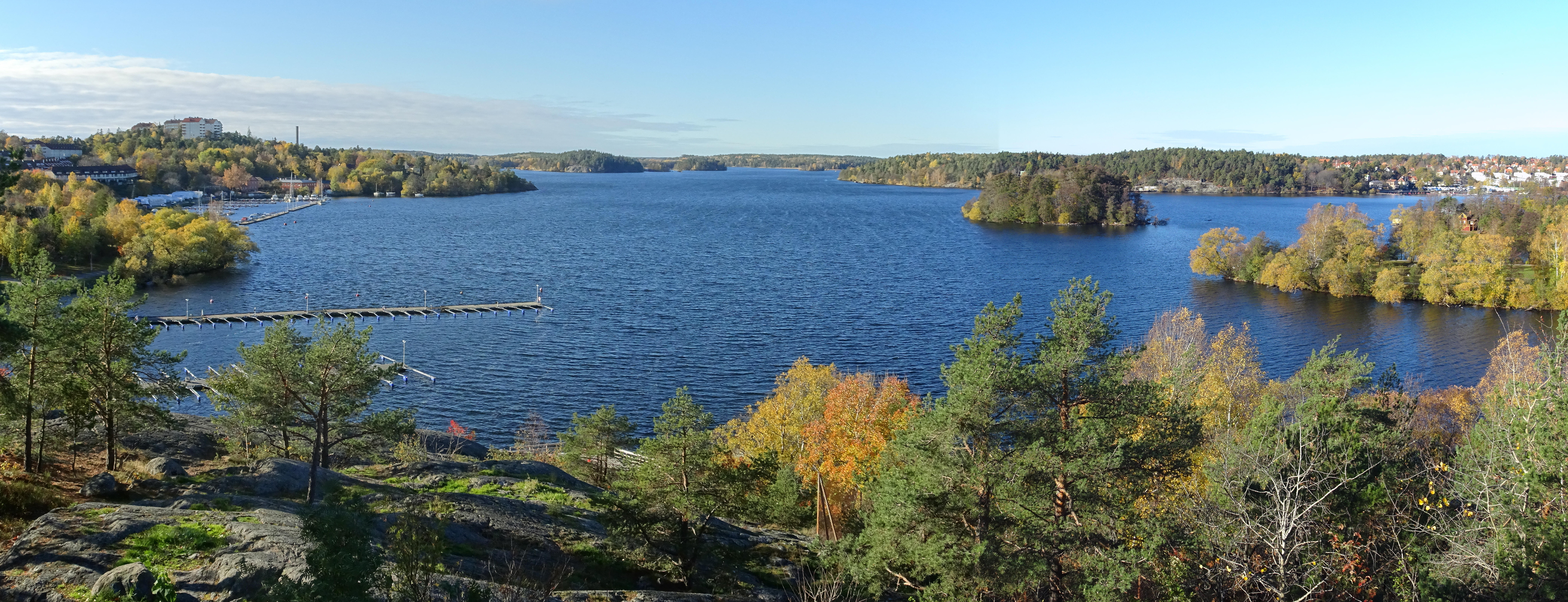 Utsikt från Örnberget mot väst